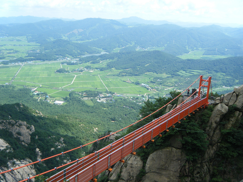 Wolchulsan bridge